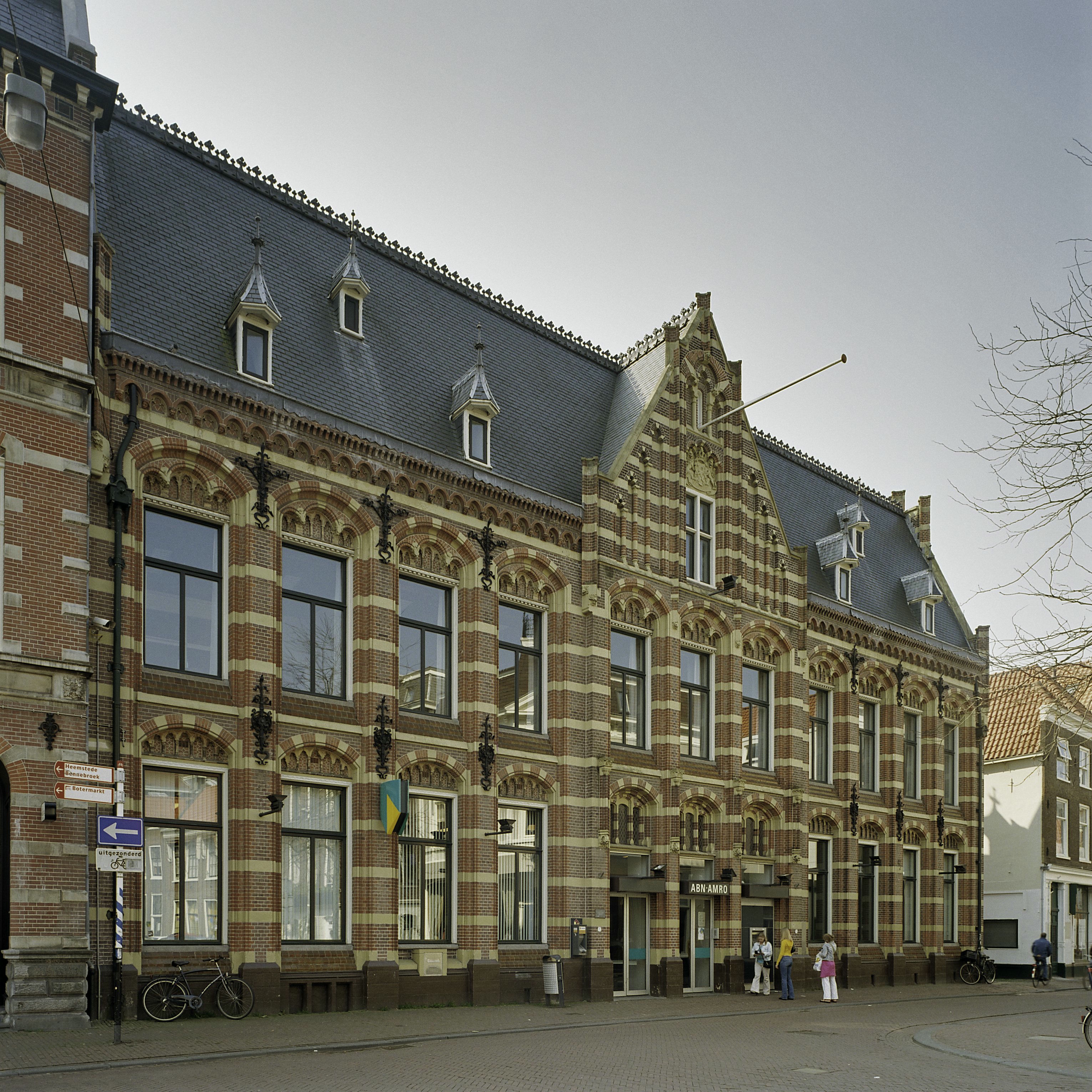 Postkantoor, voormalig: De topgevel aan voorkant wordt geleed door colonnetten en banden (opmerking: Gefotografeerd voor Monumenten In Nederland Noord-Holland)